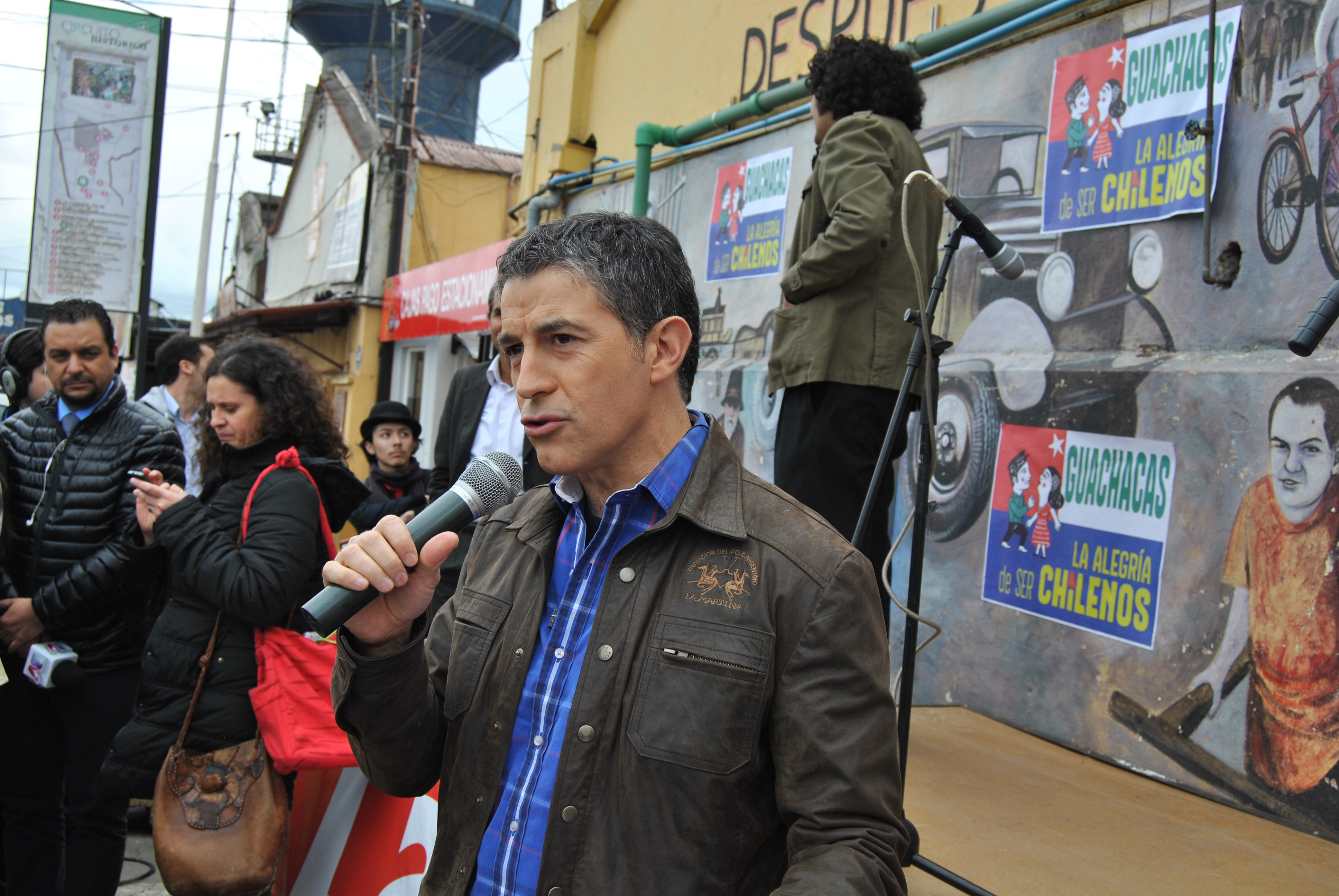 Paulo Alberto Ramírez Corvalán, más conocido como Polo Ramírez, es un periodista y presentador de televisión chileno.